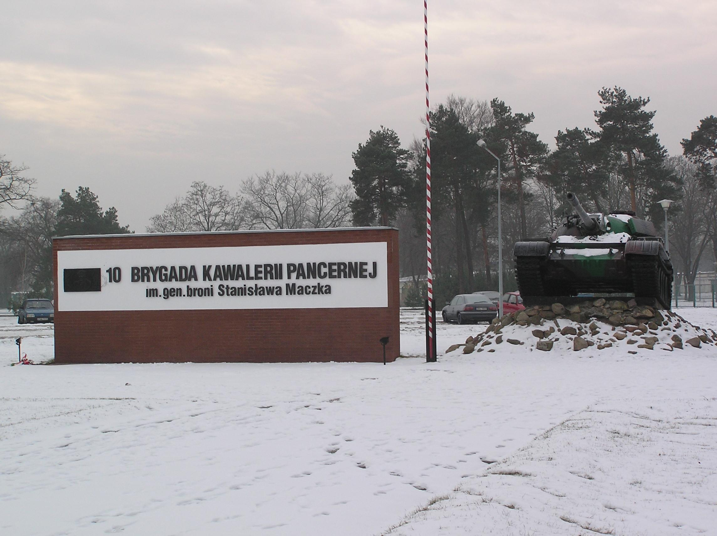 Świętoszów - 10. Brygada Kawalerii Pancernej